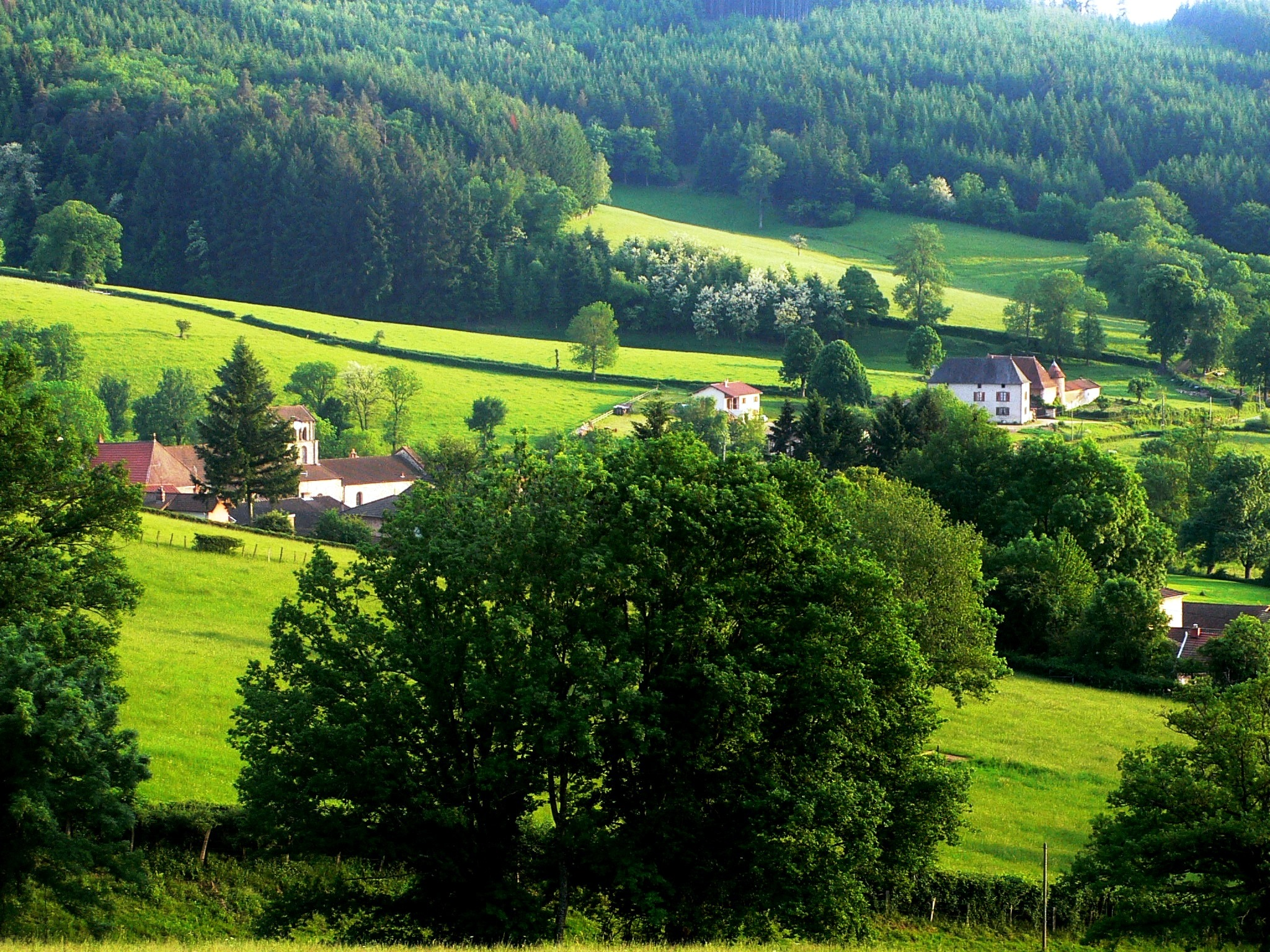 Vue générale du village d'Aigueperse dans le département du Rhône (France)